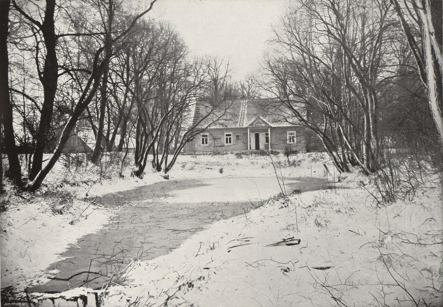 Беларуская (тарашкевіца): Кобрынь (Kobryń), вуліца Губэрніяльная (vulica Gubernijalnaja). Сядзіба Губэрня (Gubernia)